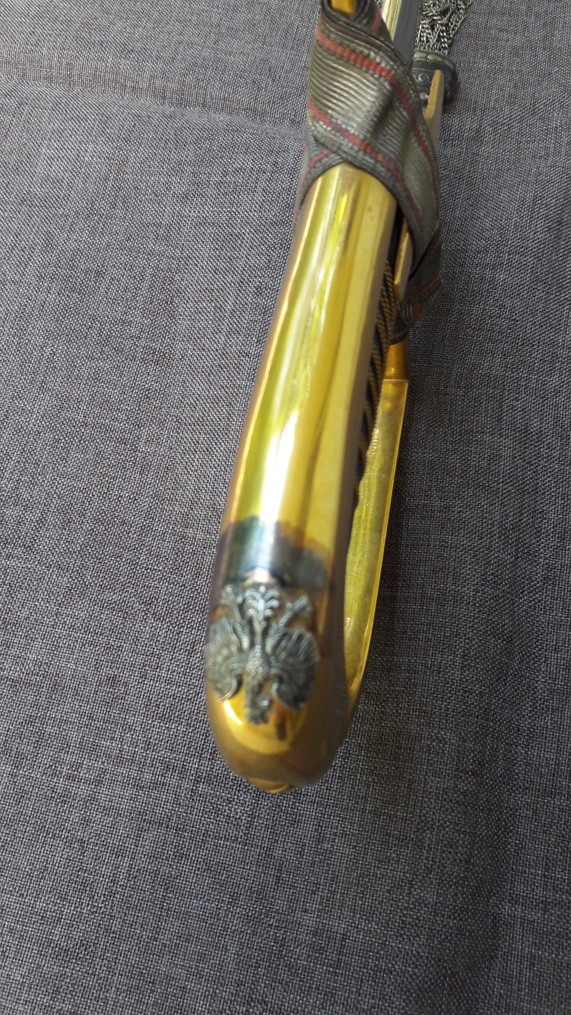 Polska szabla upominkowa wz.21 firmy G. Borowski; rok 1930. Orzełek